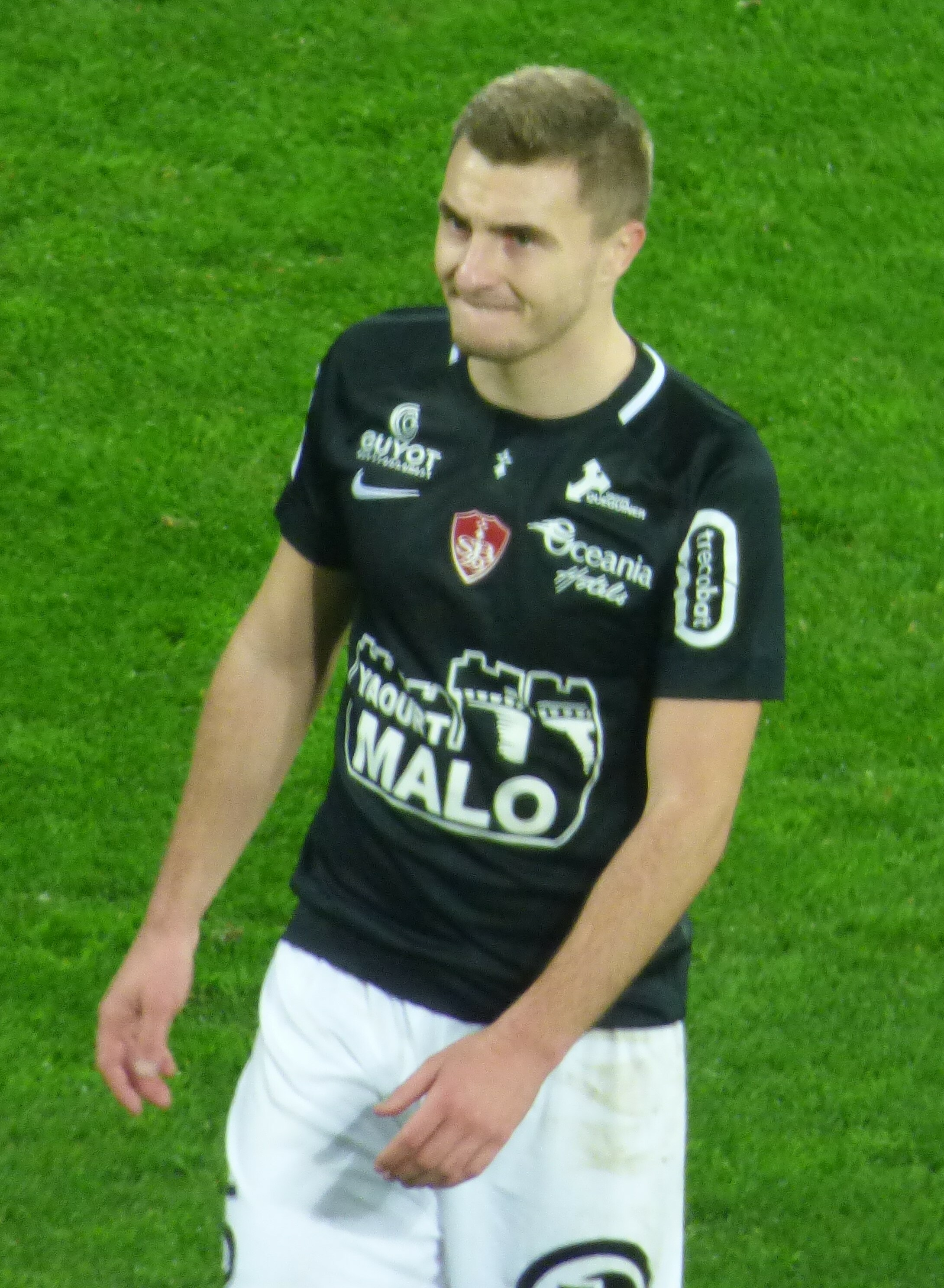 Brendan Chardonnet après le match RC Lens / Stade brestois, le 4 décembre 2018, comptant pour la dix-septième journée du championnat de France de football de Ligue 2 2018-2019, au Stade Bollaert-Delelis.